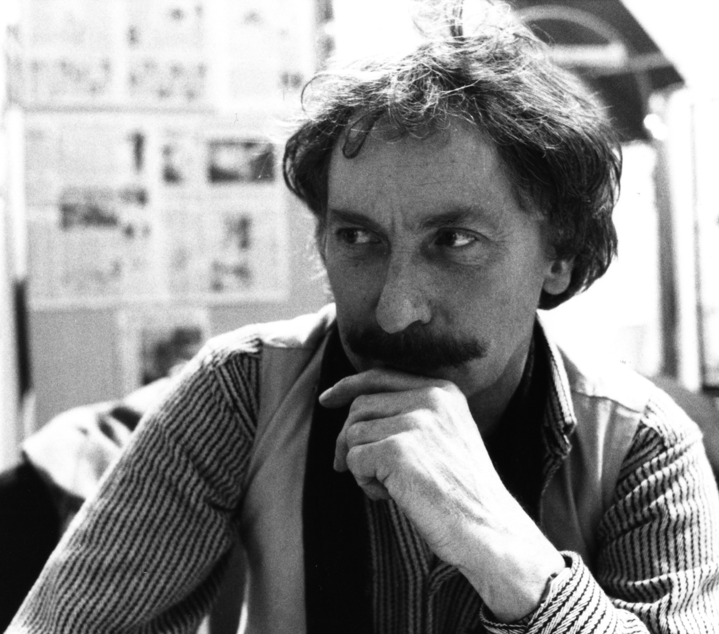 Jean-Claude Forest, fotograferad av Cristian Hammarström på seriefestivalen i Angoulême i januari 1987. Beskuren bildversion.